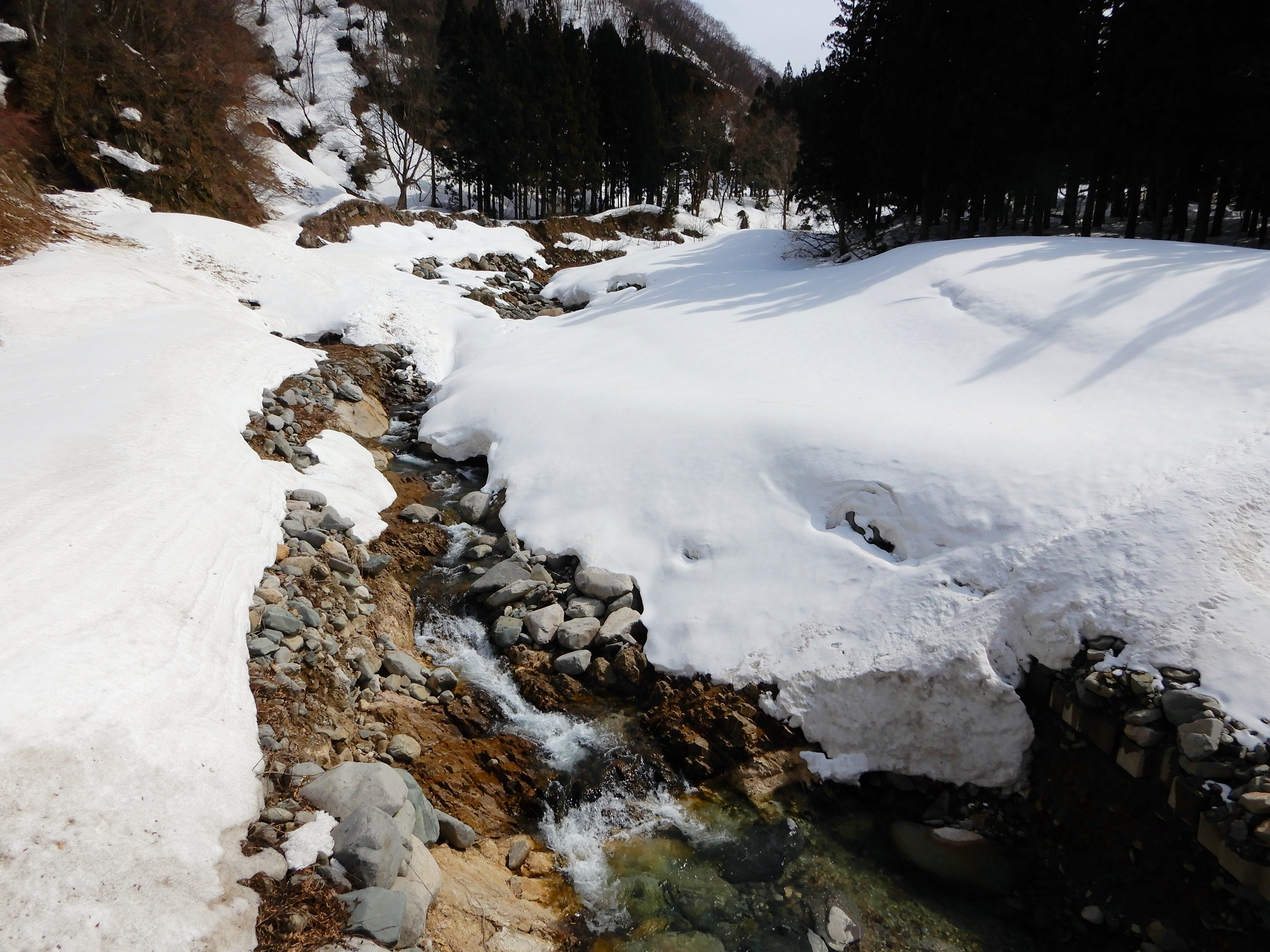 二子沢橋からの二子沢川 2019-3-19